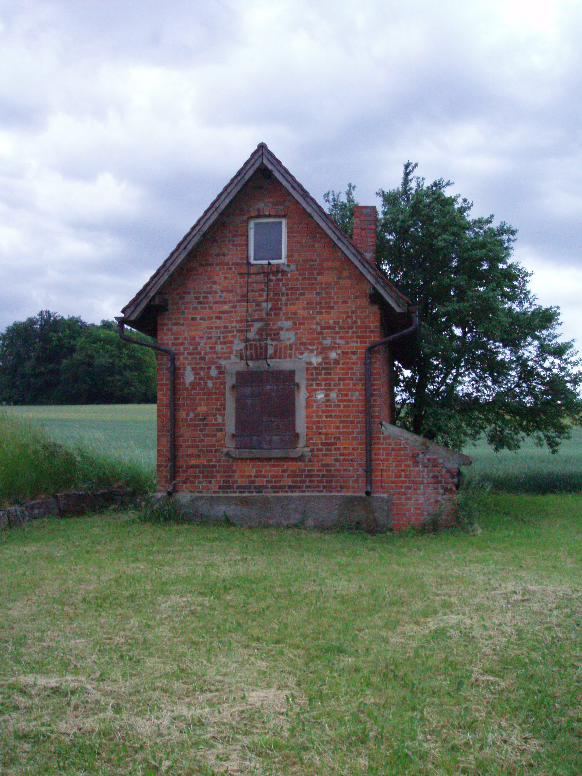 Historische Pumpstation Schainbach von 1912